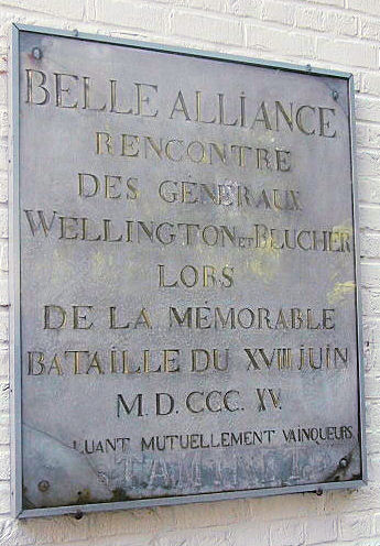 Plaque commémorative jadis au-dessus de la porte de la Belle-Alliance. Aujourd'hui au Caillou